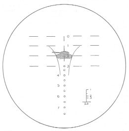 Description